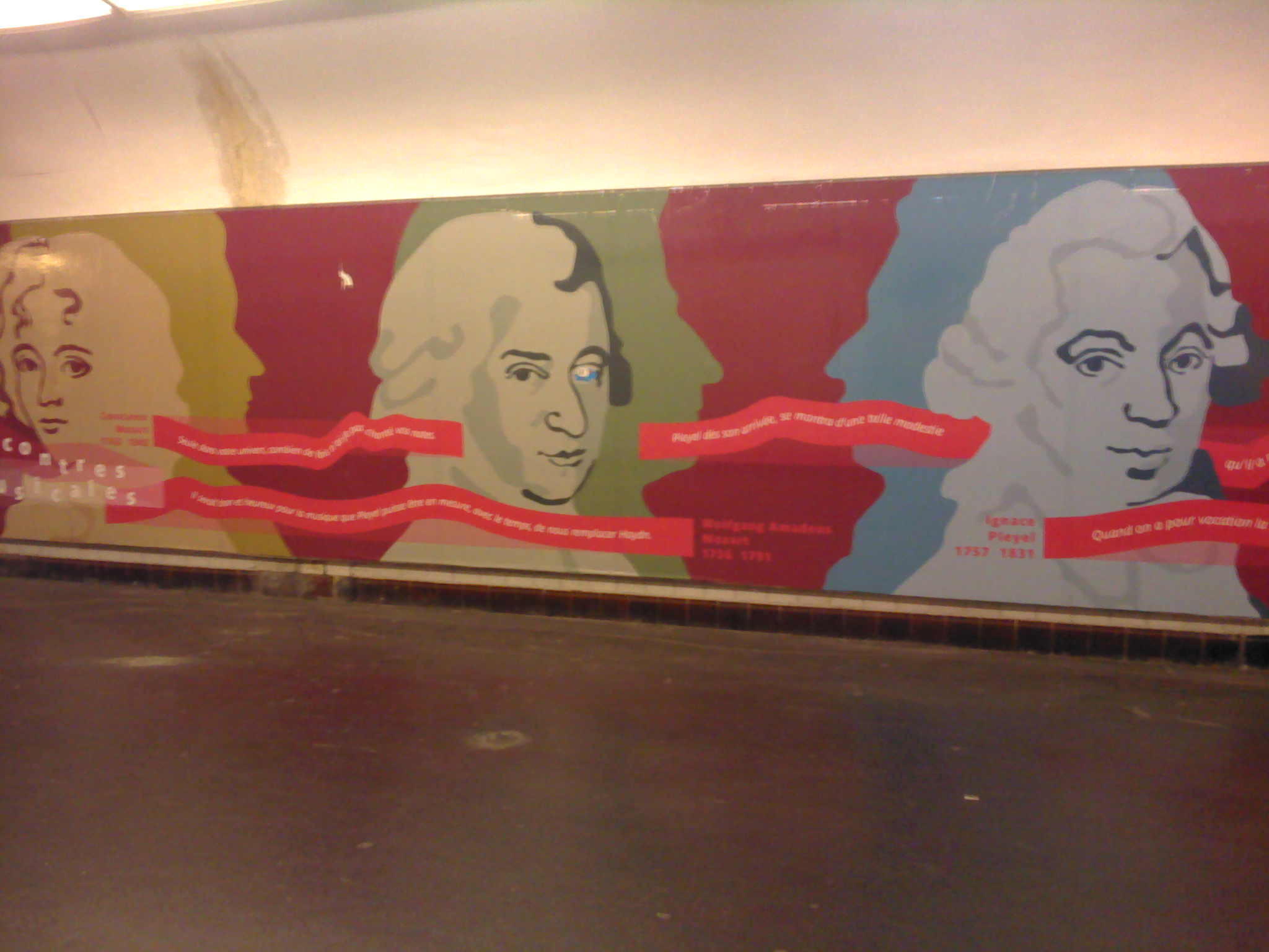 décoration métro Carrefour Pleyel